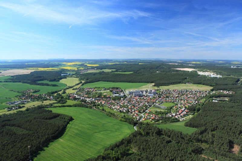 Schválená fotografie městem Horní Bříza pro zobrazení na wikipedia.cz